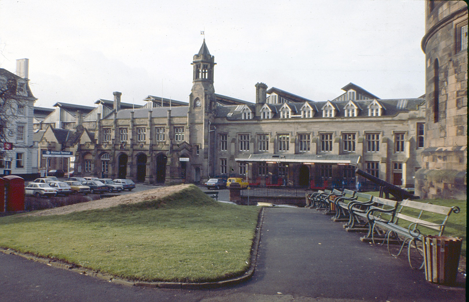 April 1983